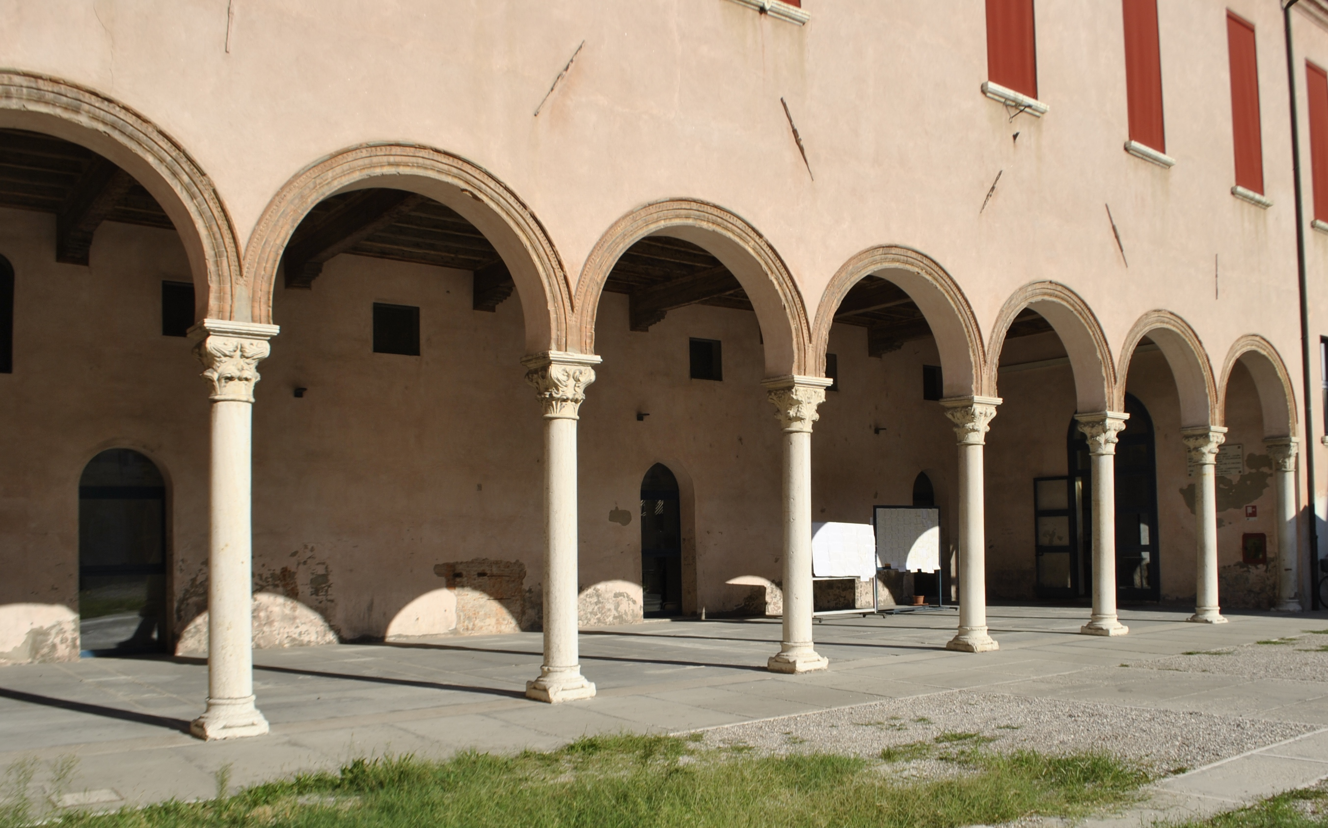 Loggia del cortile. Palazzo Pendaglia - IPSSAR Orio Vergani This is a photo of a monument which is part of cultural heritage of Italy.